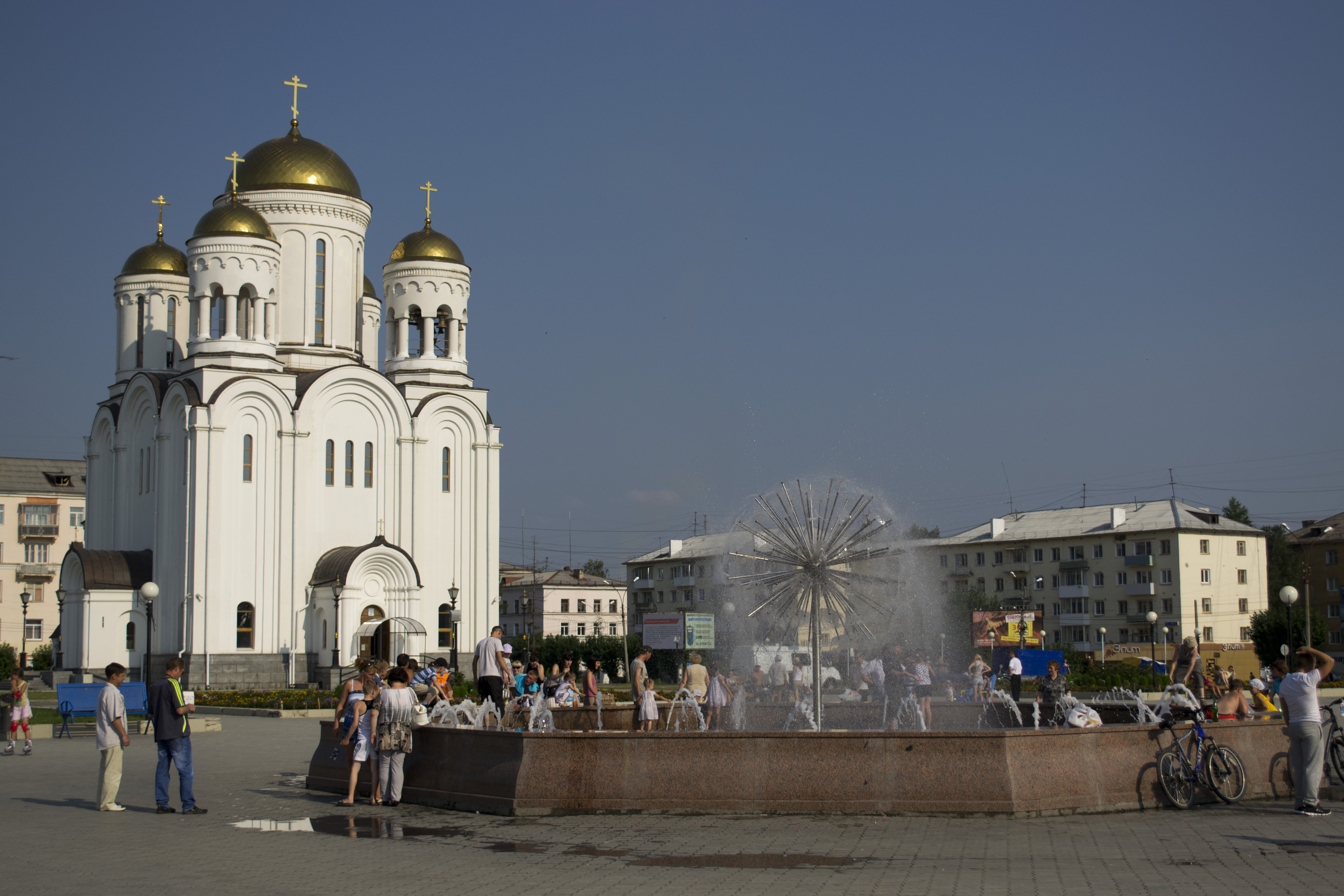 площадь Серова